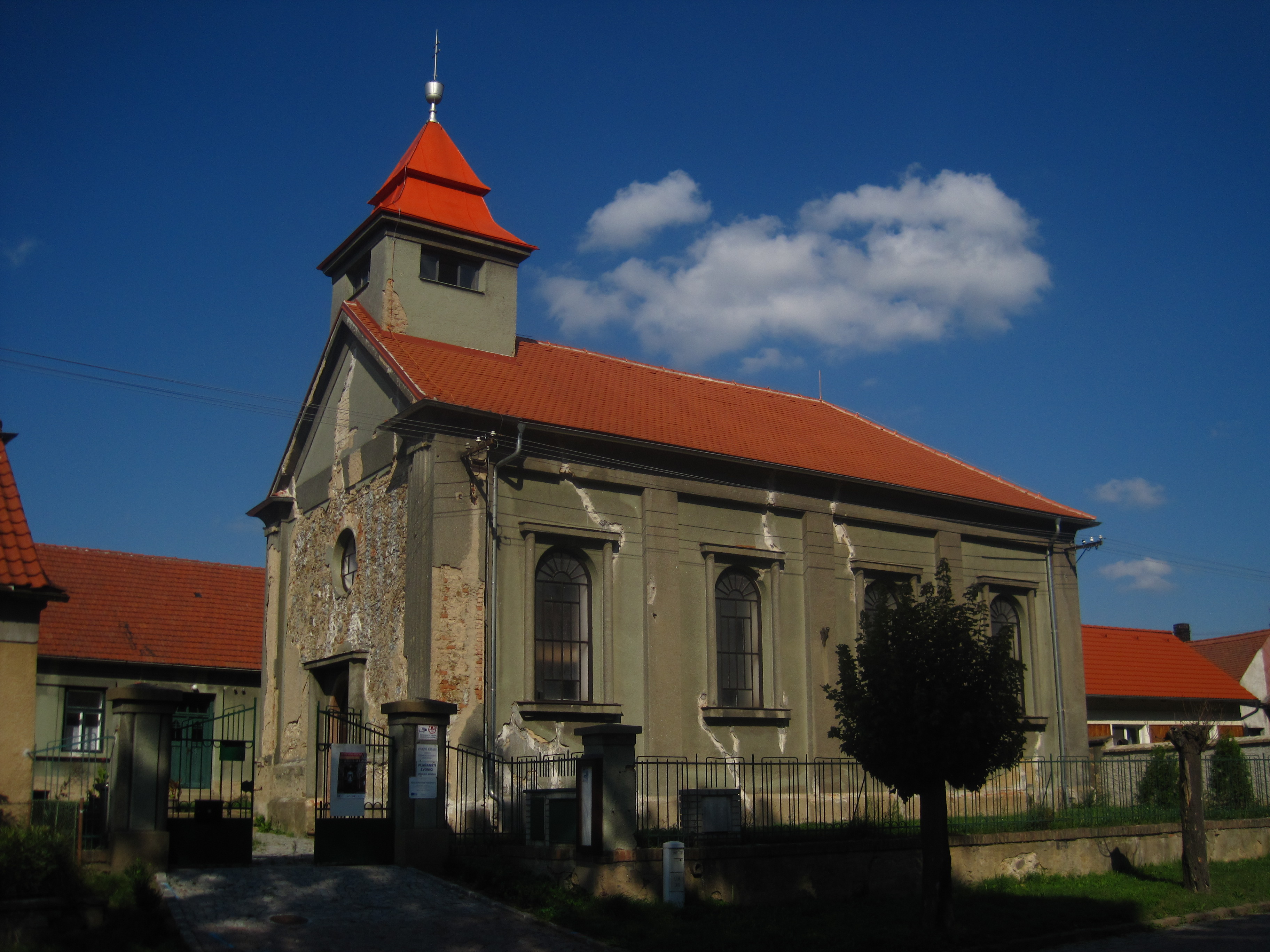 Synagoga – husitský kostel, Pražská, Plaňany.